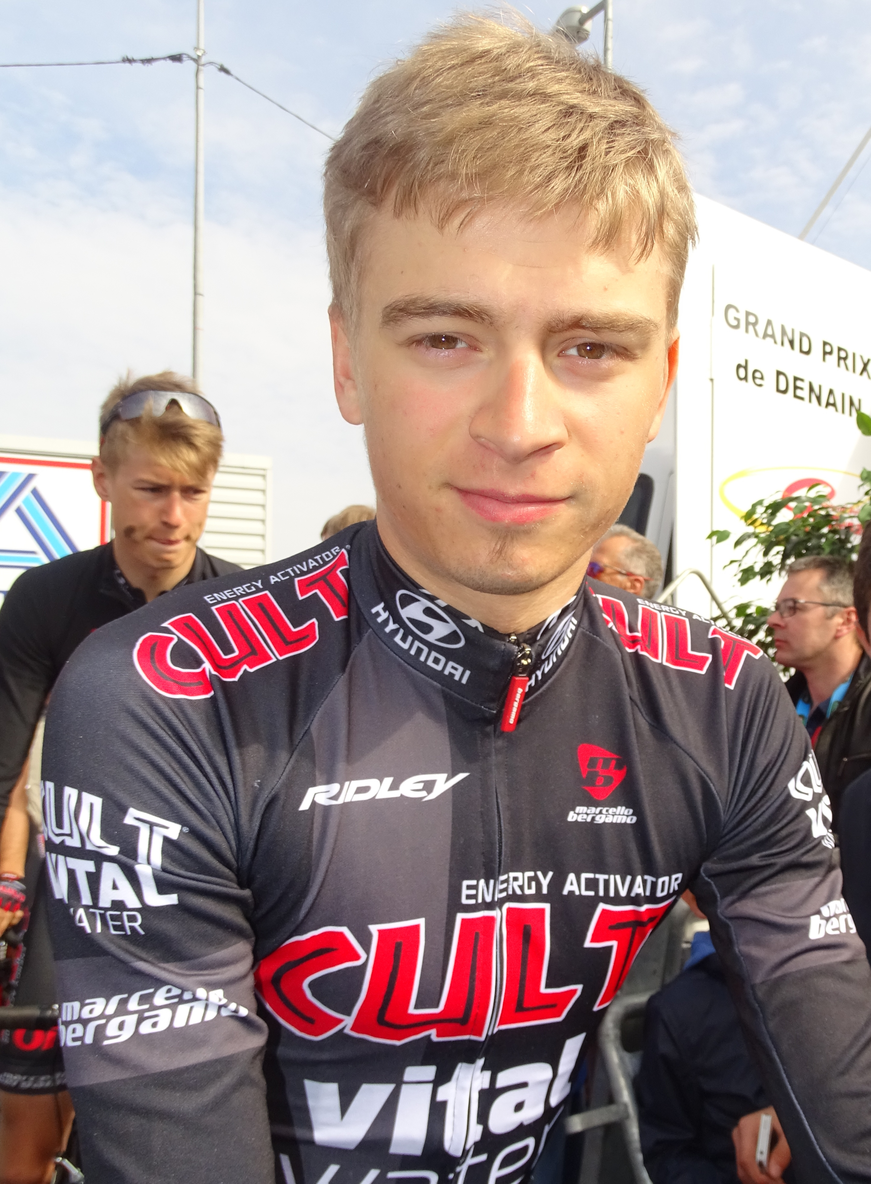 Reportage réalisé le jeudi 16 avril à l'occasion du départ et de l'arrivée du Grand Prix de Denain 2015 à Denain, Nord, Nord-Pas-de-Calais, France.